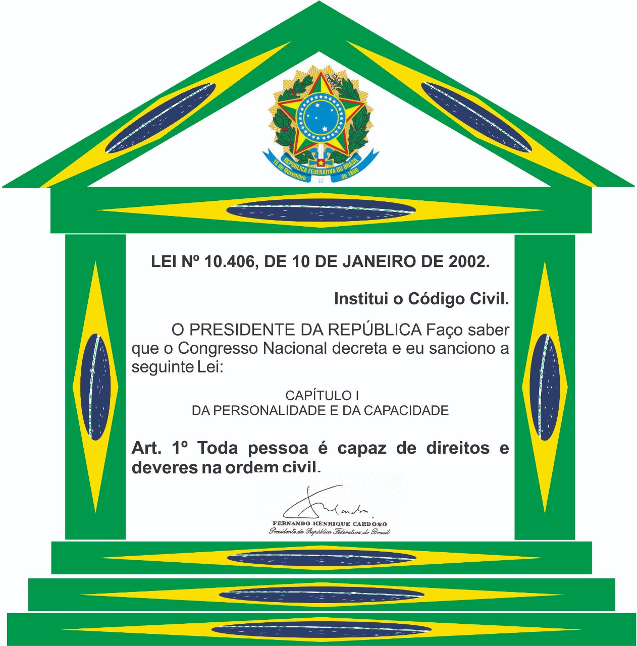 Pórtico cerimonial do Código Civil Brasileiro de 2002 com Bandeira do Brasil, contendo o artigo 1ª da Lei nº 10.406, de 10 de janeiro de 2002